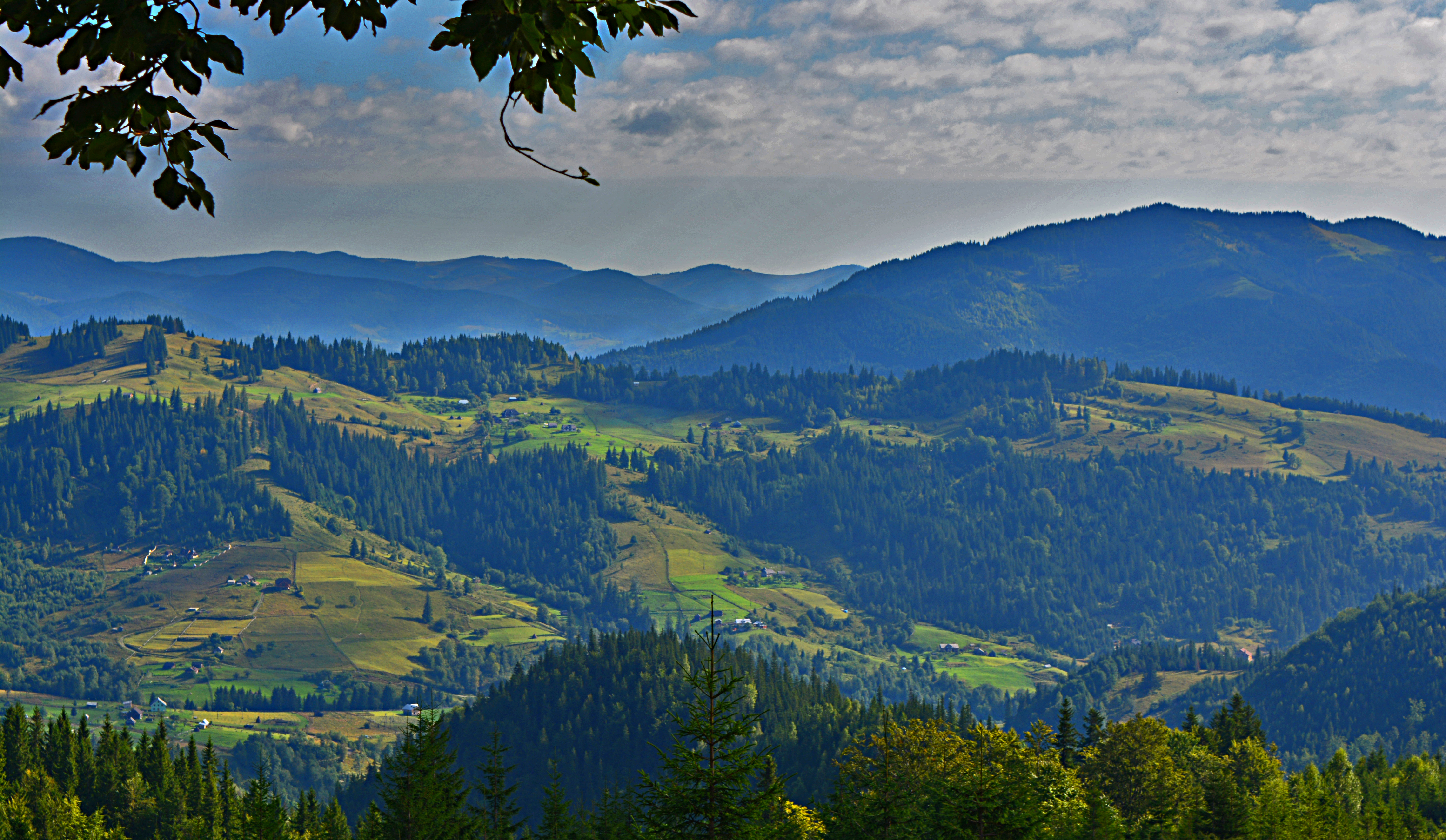 Фотографія с.Дземброні в Карпатах